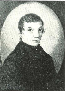 Selbstportrait von Johann Georg Weibhauser